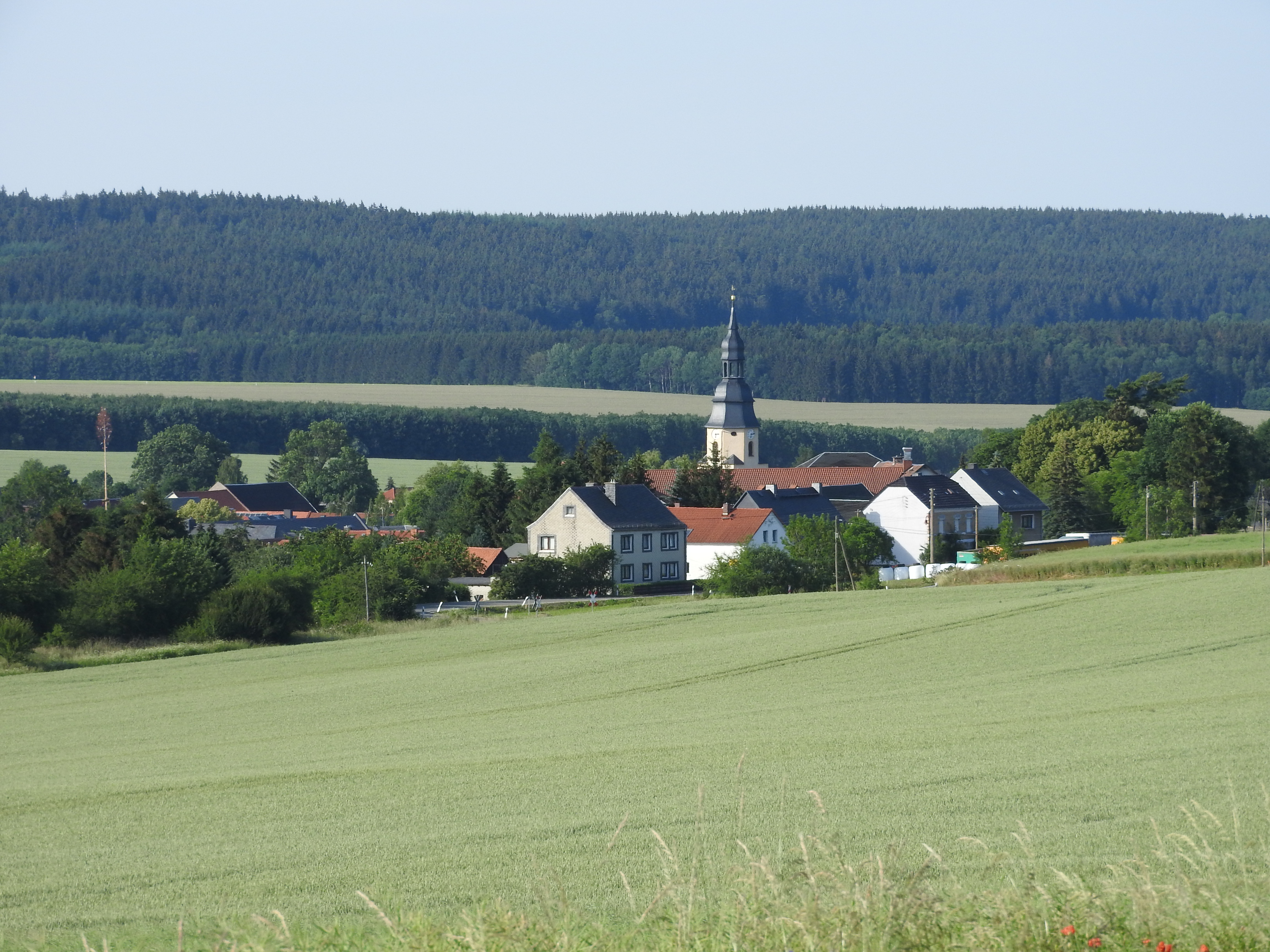 Blick auf Moßbach, Thüringen